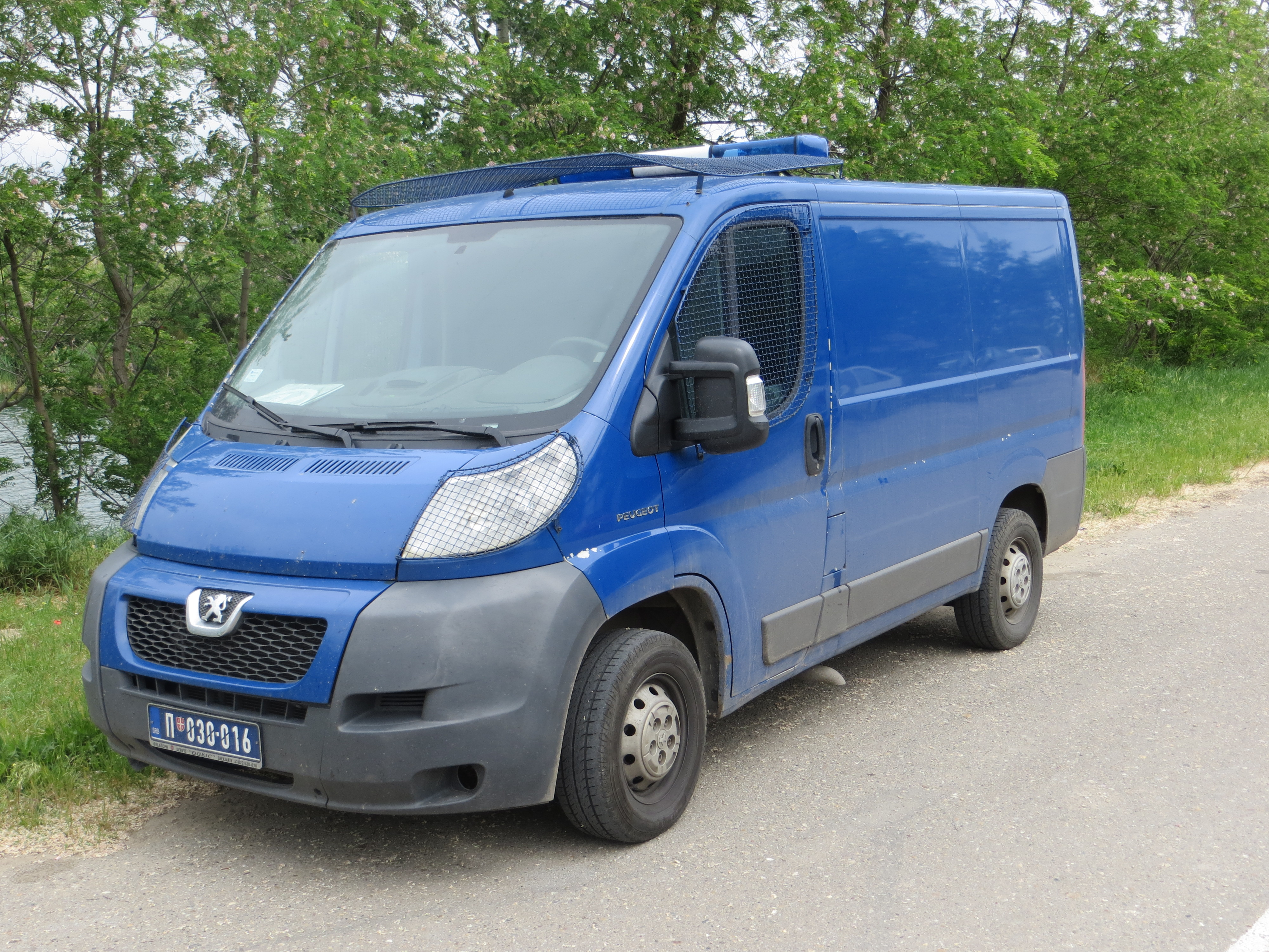 Politieauto uit Servië